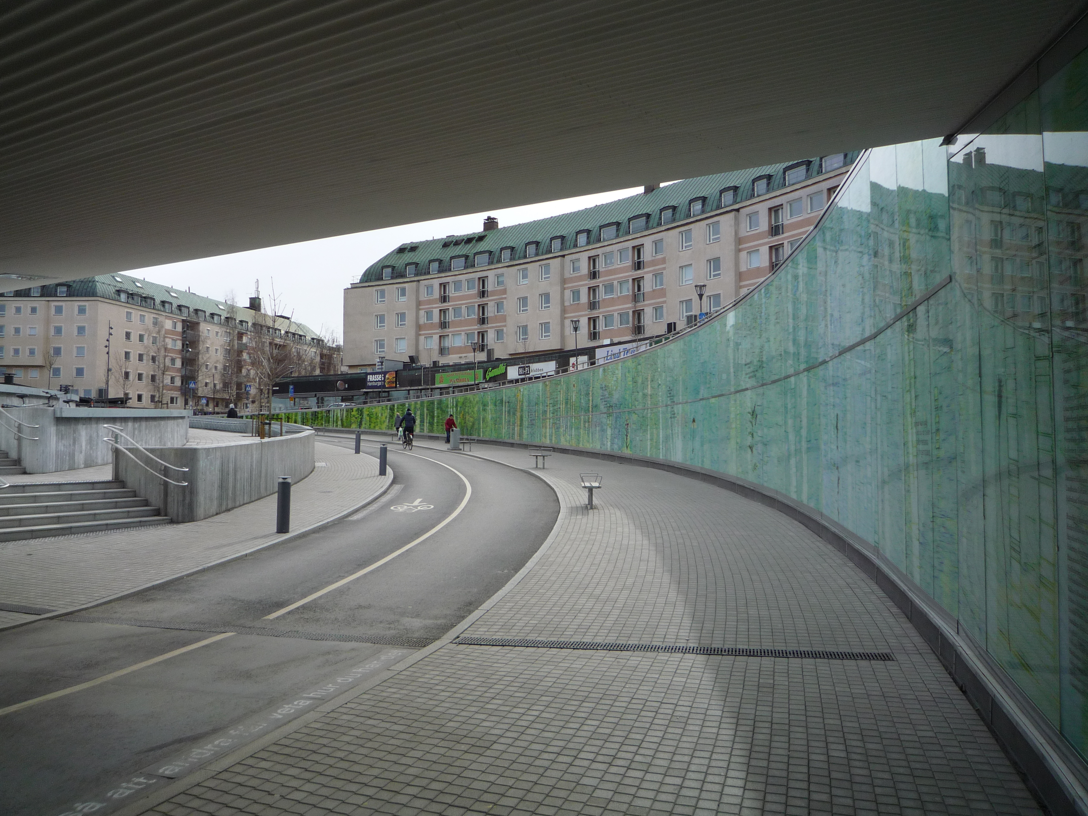 Konstverket "Lev!" inramar gång-/cykeltunneln vid Umeå centralstation med väggar av glas.